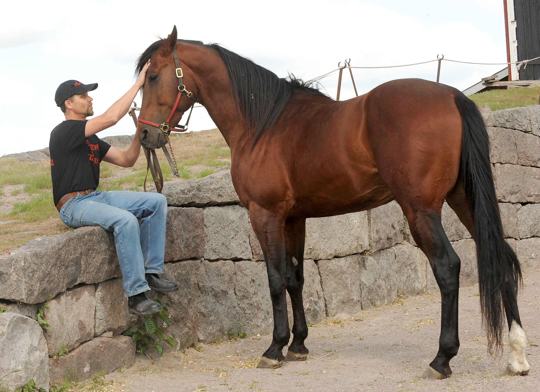 Kanal 75 Media . Prince Tagg och Ralf Karlstedt. Foto: Lars Jakobsson